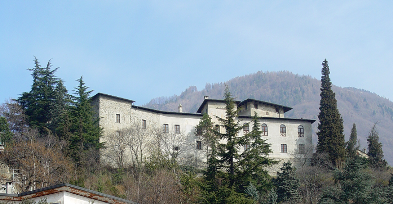 Descrizione: Casel Masegra a Sondrio Luogo: Sondrio Data: 12 marzo, 2003 Fotografo: TheCADexpert Categoria:Immagini esclusivamente in GNU FDL